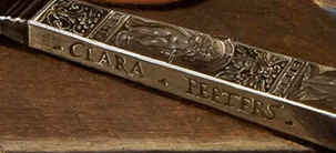 detail: Signature